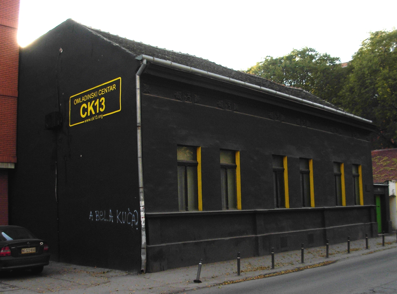 Ulična fasada omladinskog centra CK13 (Crna kuća) u Novom Sadu.